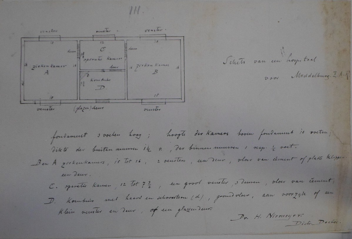 Plan vir voorgestelde Middelburg Hospitaal 1890 Dr H Niemeyer